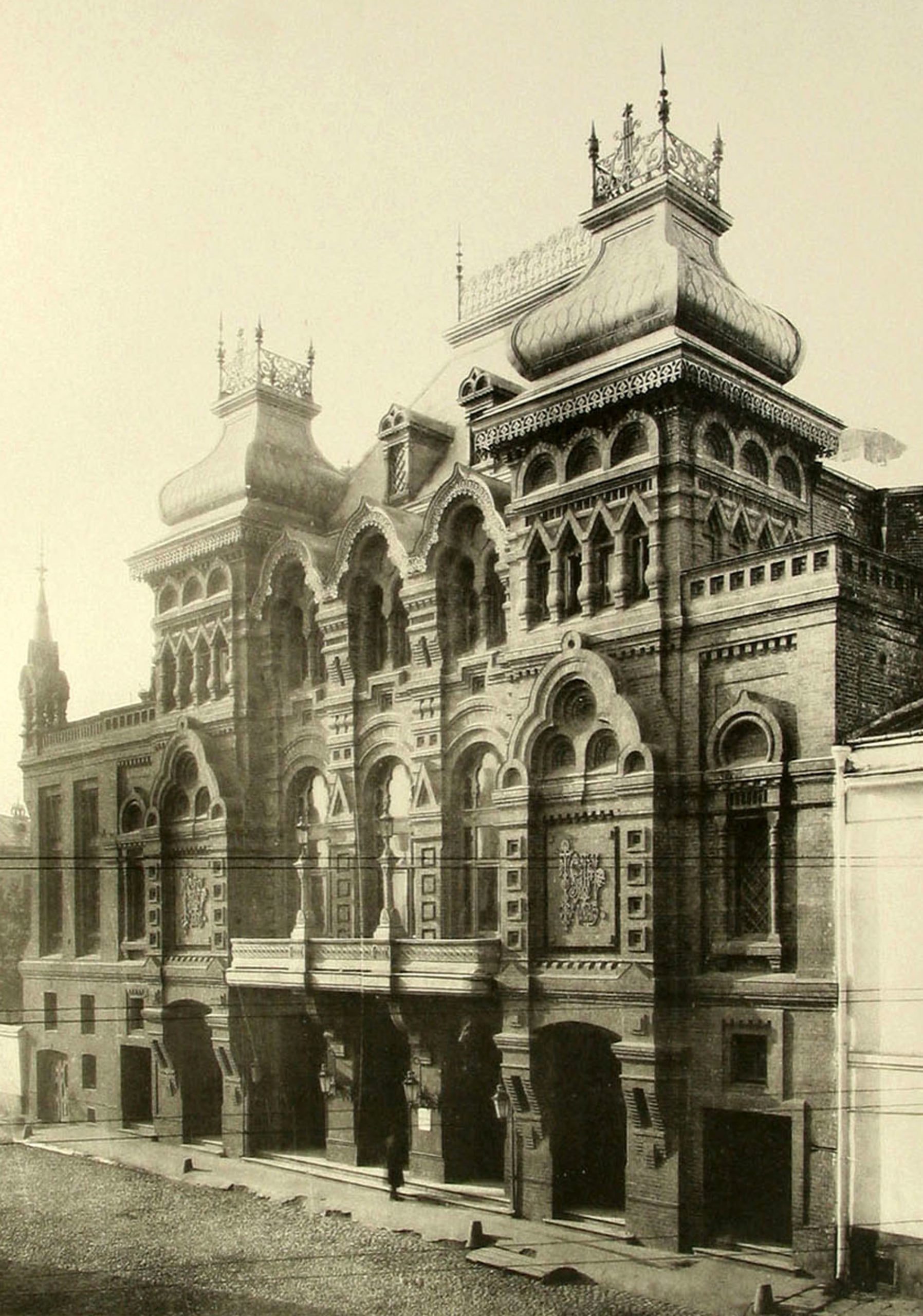 Здание театра "Парадиз" построено в 1885 г. Архитекторы К.В. Терский и Ф.О. Шехтель (фасад театра). В настоящее время театр Маяковского.